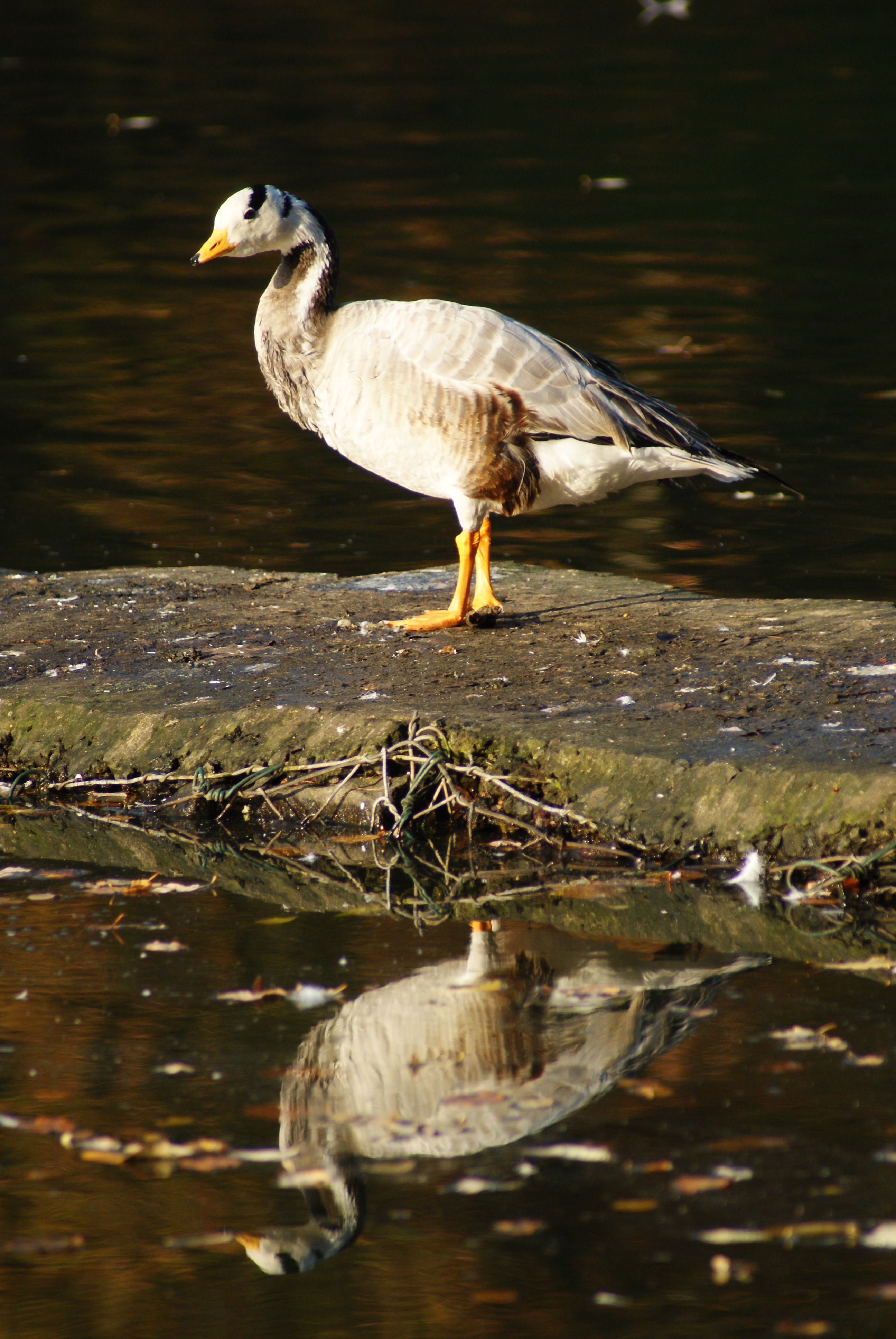 Oie à tête barrée (Anser indicus) - Bois des Bruyères (Waterloo)